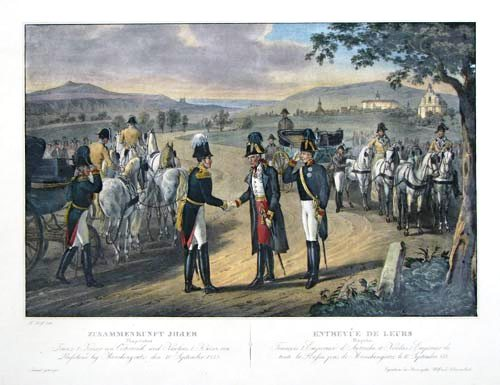 Treffen von Franz I. von Österreich und Nikolaus I. von Russland in Münchengrätz (Mnichovo Hradiště) am 10. September 1833